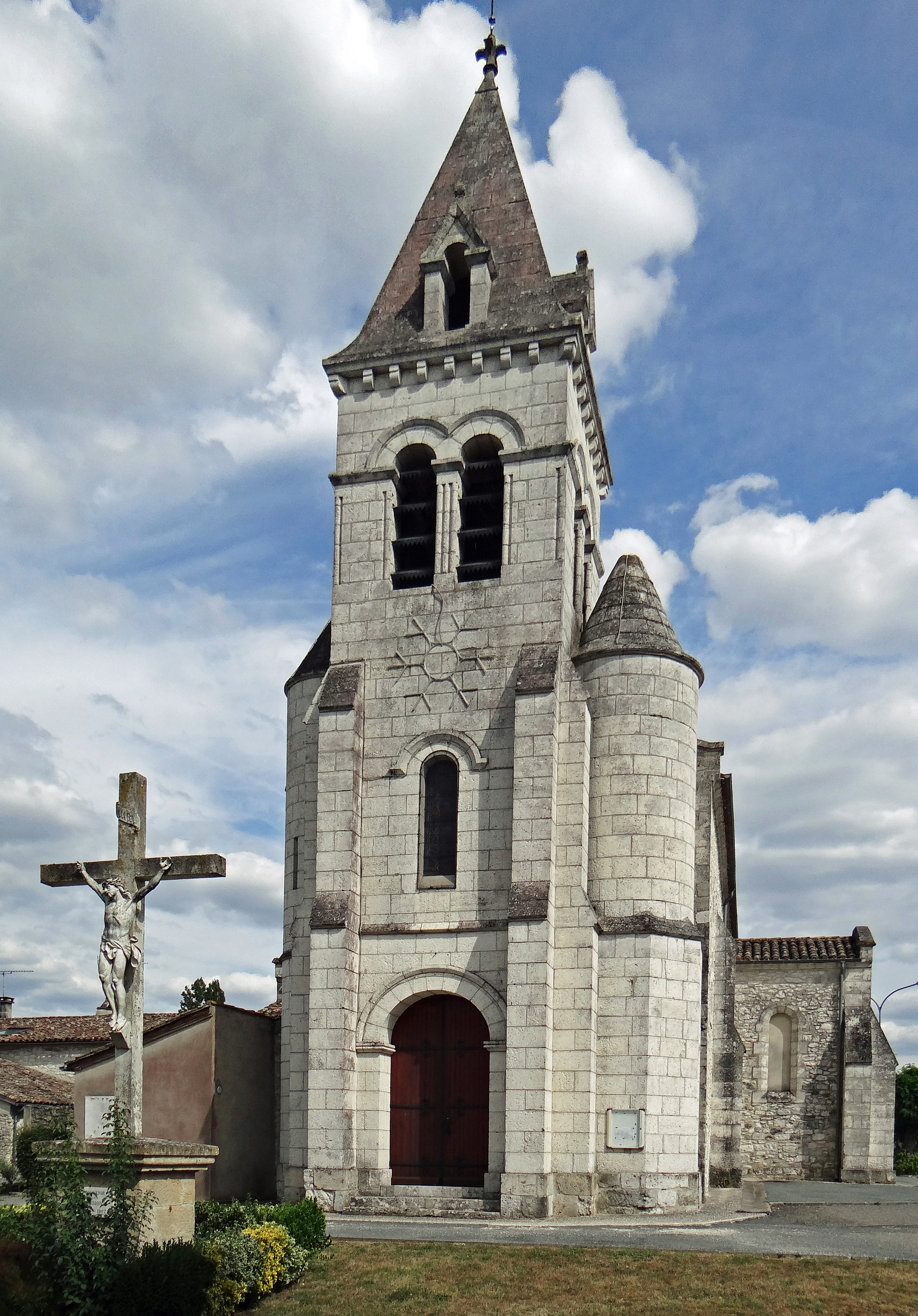 Lacausssade - Église Sainte-Thérèse des Bastides